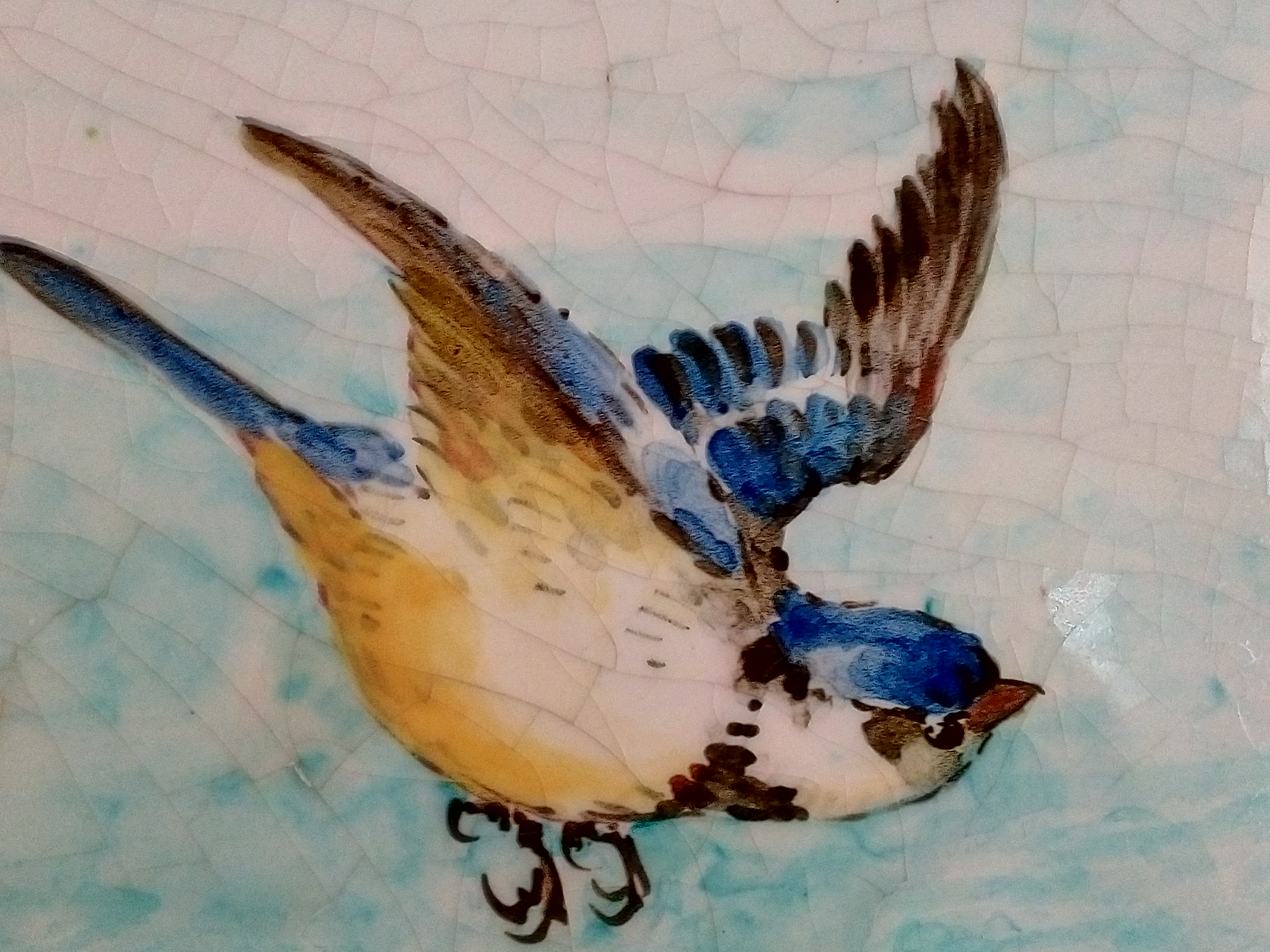 détail d'un panneau décoratif montrant un oiseau